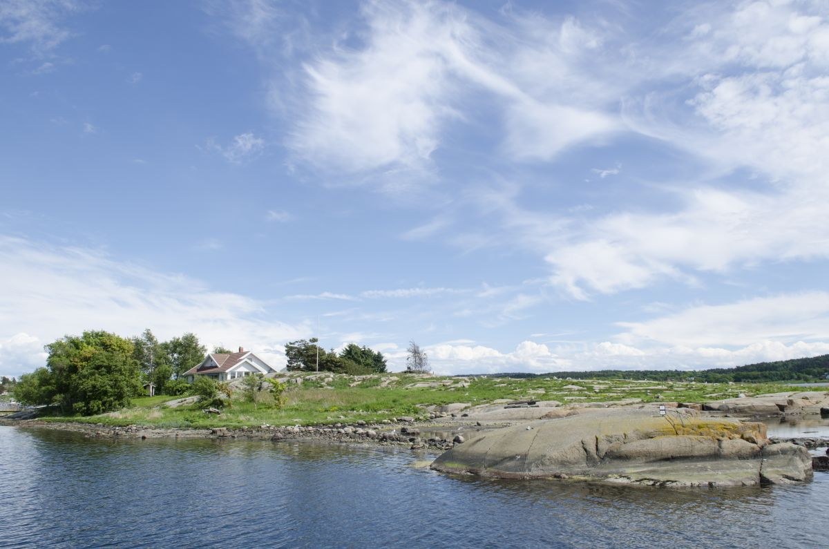 Den sørlige delen av verneområdet.